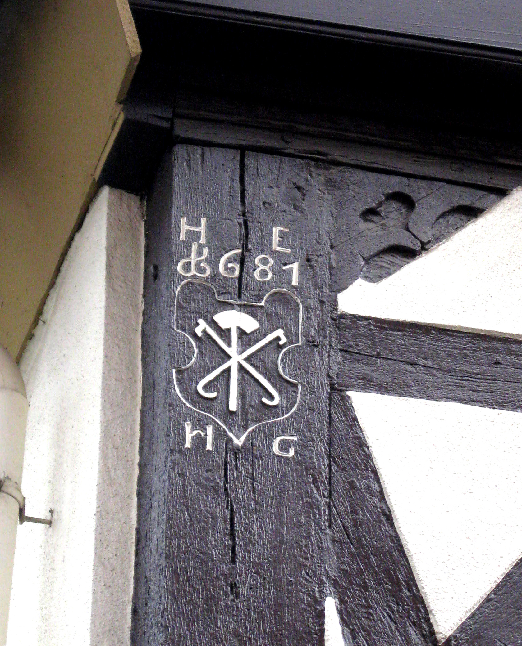 Handwerkszeichen eines Küfers am Haus Bergbornstraße 5 in Frankweiler, mit Jahreszahl 1681